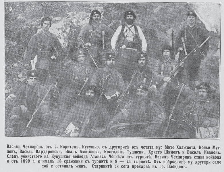 Vasil Chehlarov IMARO cheta